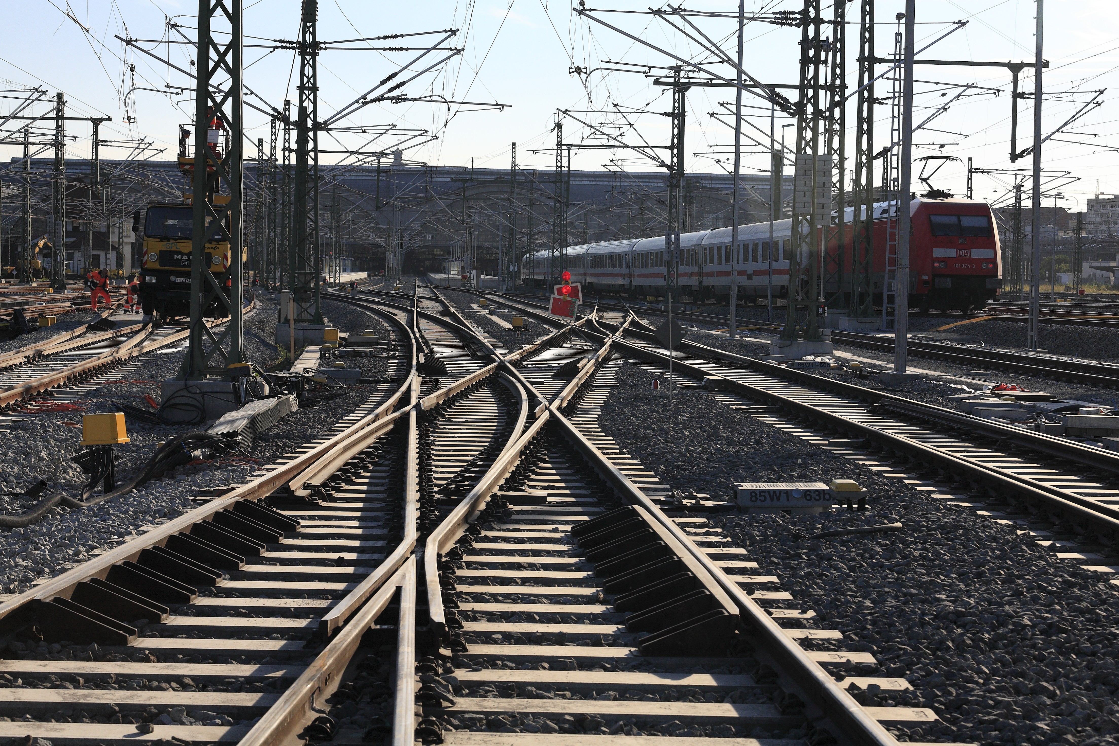 Strecke 5919, Gleis 13, rechts Gleis 12. Die Weiche 161 steht für eine Fahrt von Gleis 14 nach Gröbers in Linkslage. Die Weichenstraße von links unten nach rechts oben ermöglicht Fahrten zwischen den Bahnsteiggleisen 12 und 13 und Dresden sowie Chemnitz, für das Gleis 14 bietet die EKW eine Umfahrstraße von und nach Dresden und Chemnitz.